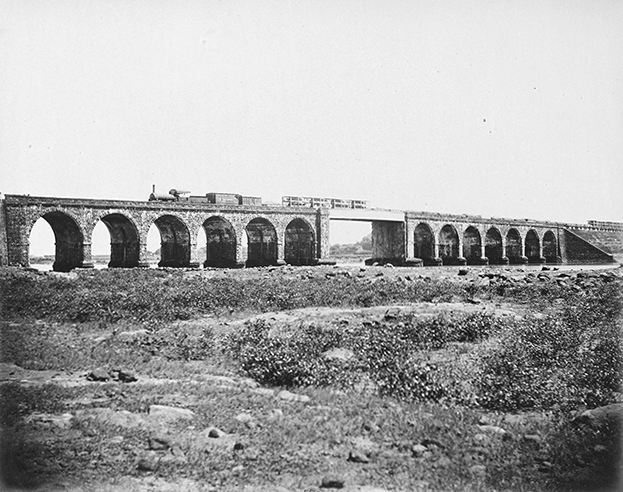 Tanna Railway Viaduct